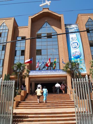 En el año 2001 se levantó esta Catedral Evangélica en la comuna de Maipú. Calle Hermanos Carrera 2685, Maipú, Santiago de Chile.